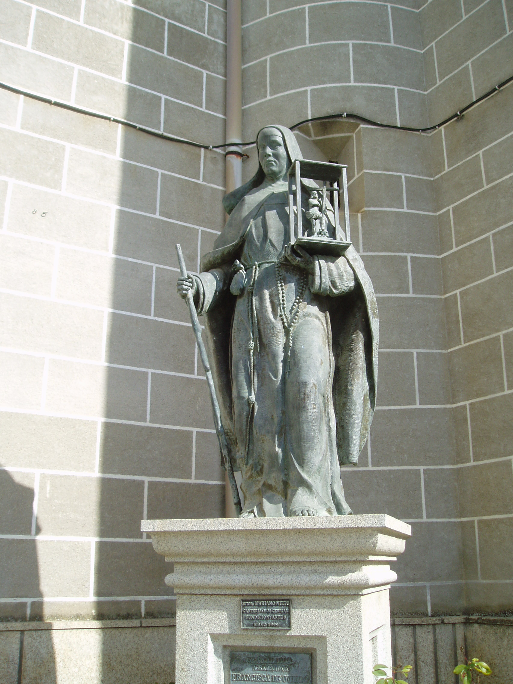 Estatua de la beata Francisca de Oviedo en Serradilla.